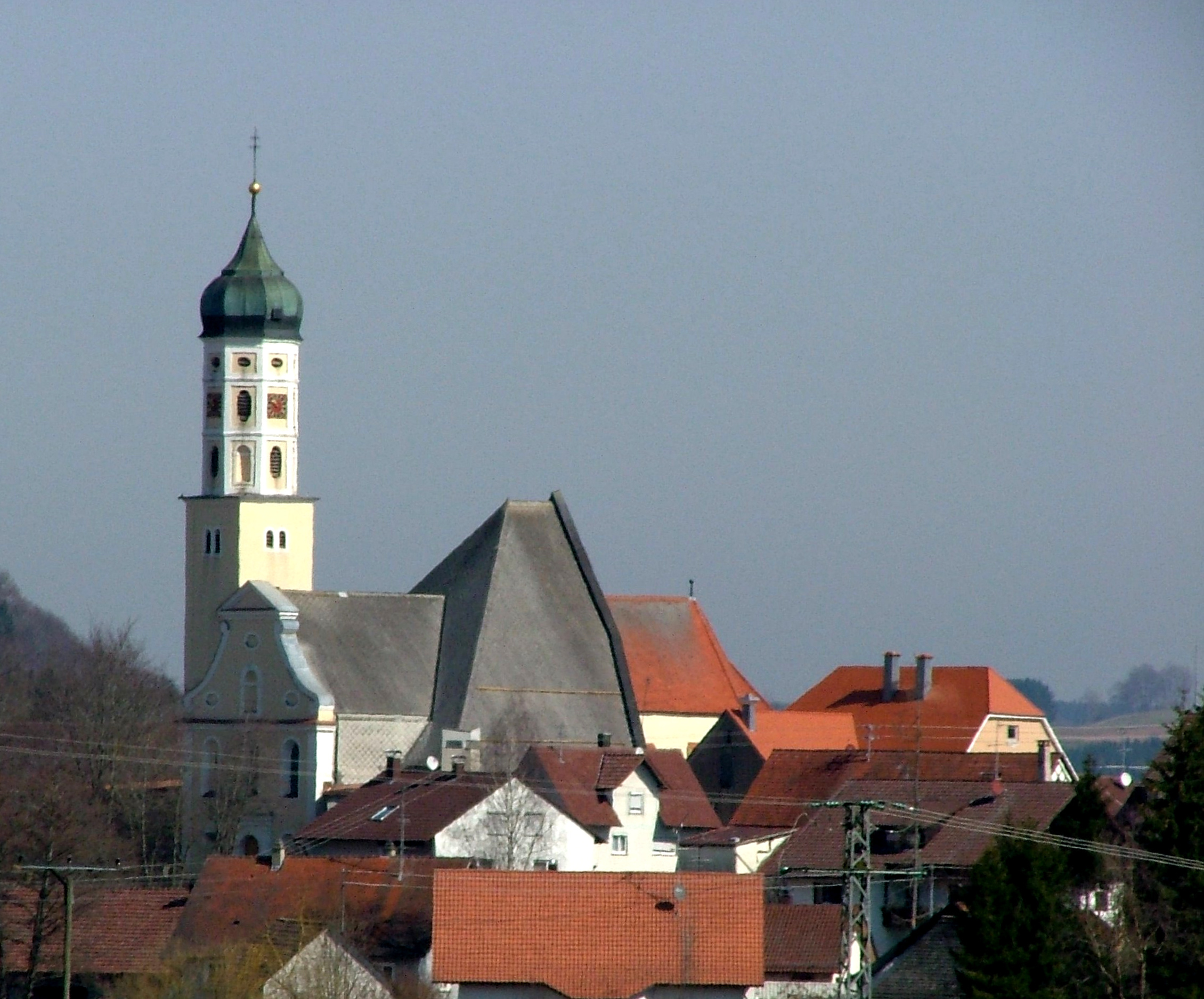 Eberhardzell